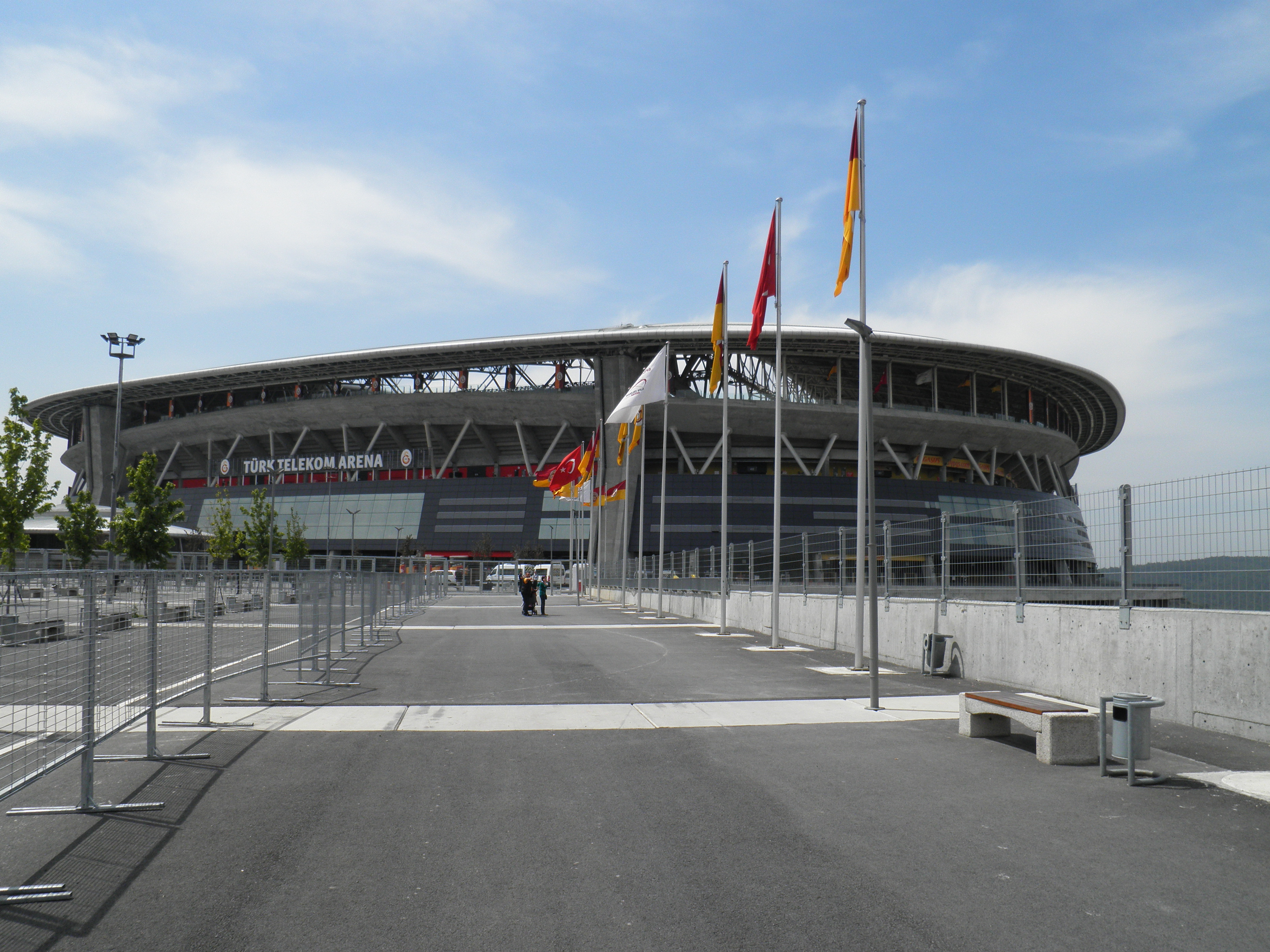 Turk Telekom Arena